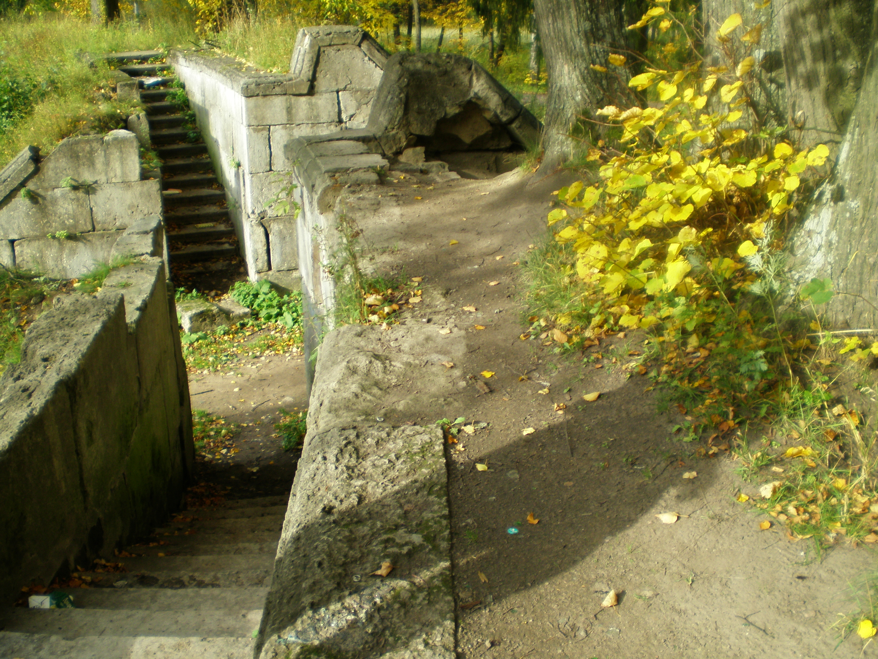 Амфитеатр в музее-заповеднике Гатчина